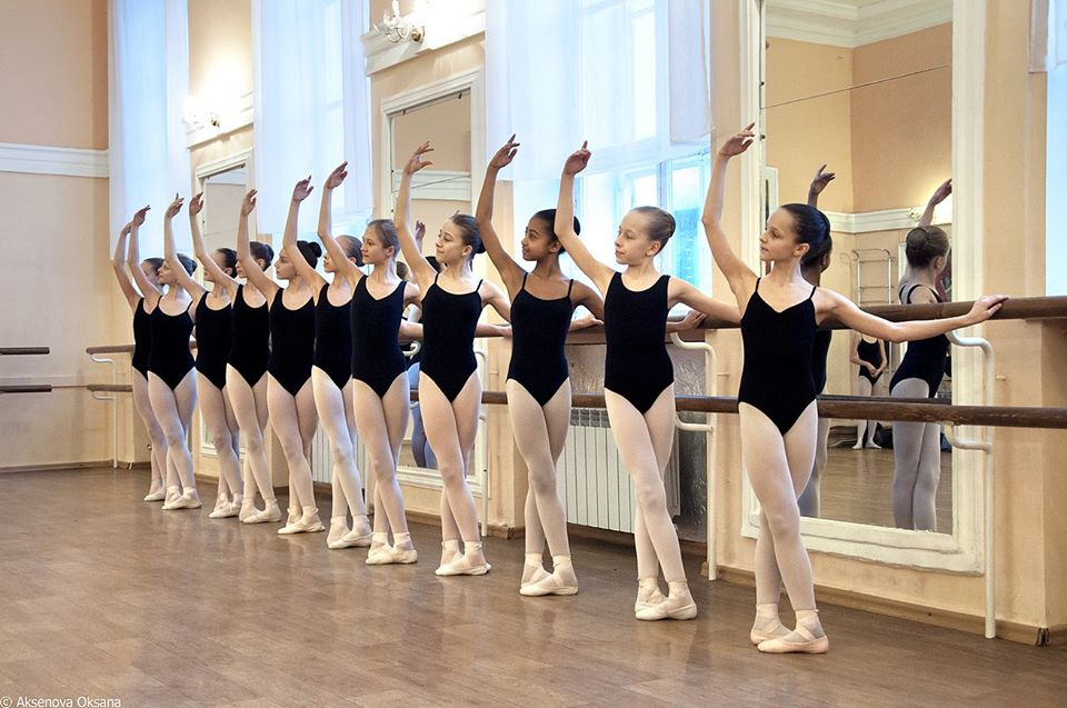 Культурный Центр Кияночка